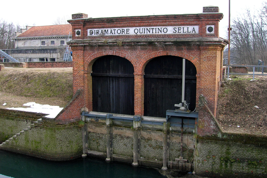 La presa del Diramatore Quintino Sella dal Canale Cavour in località Veveri (Novara)